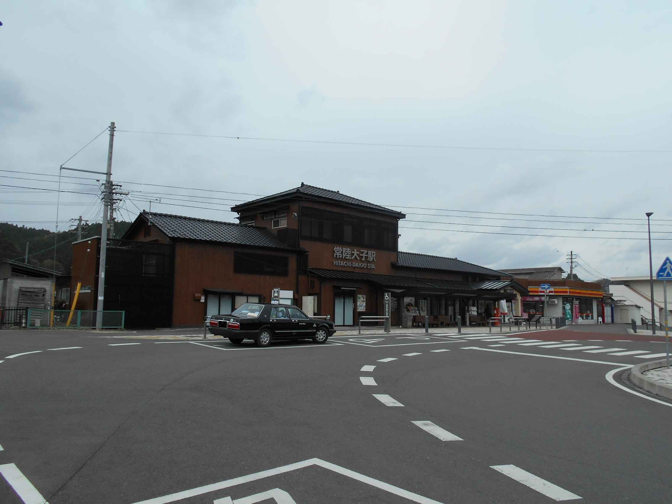 JR東日本 常陸大子駅